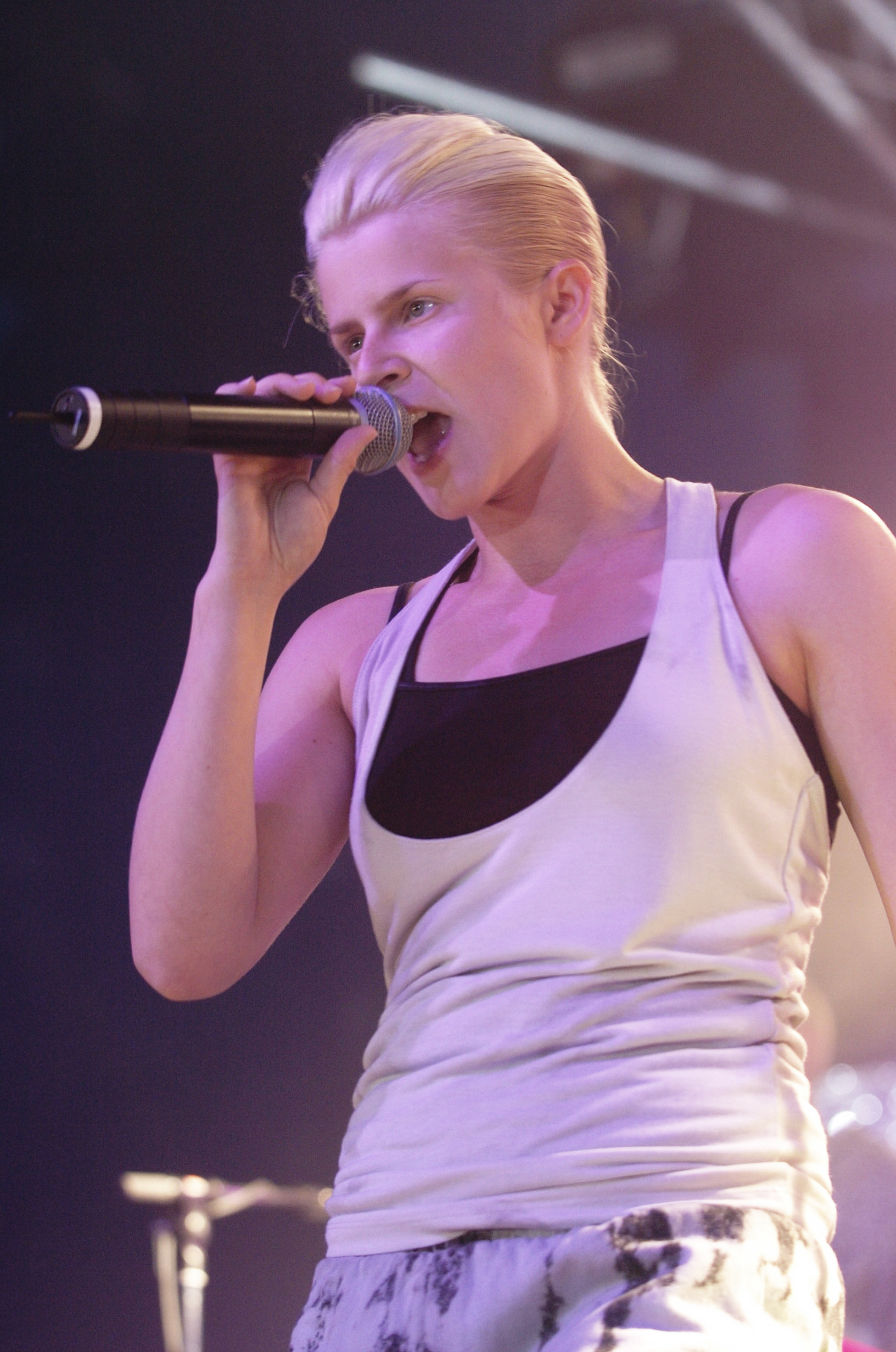 Robyn på Arvikafestivalen